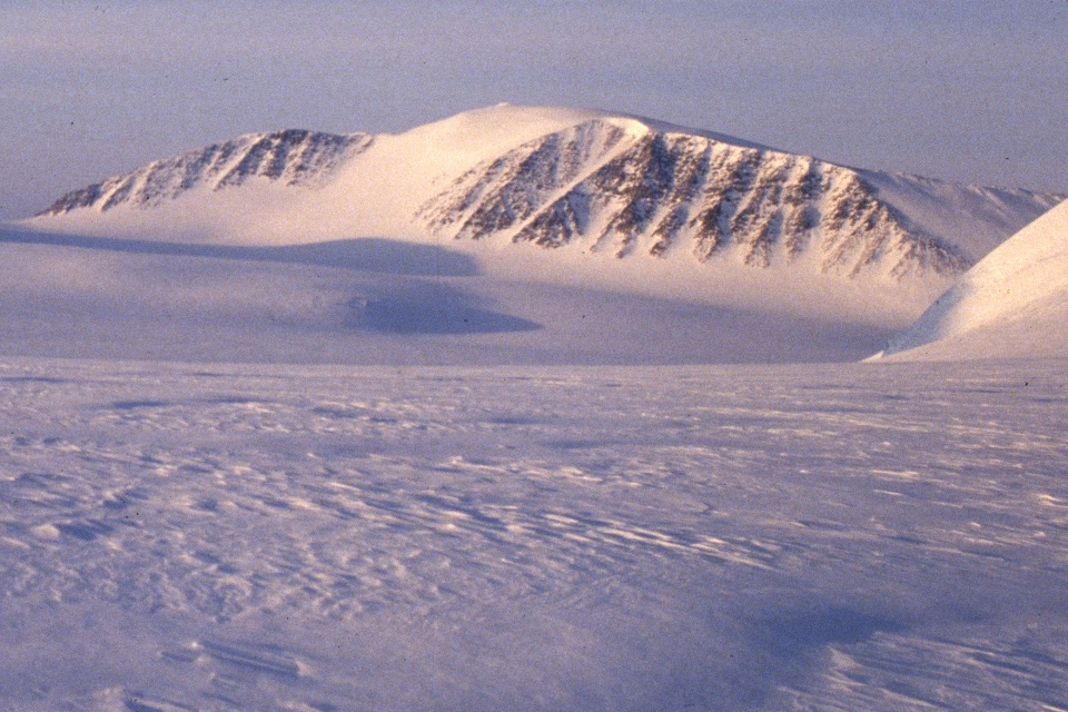 Vue de la face sud-ouest du mont Newton depuis le sud. Au premier plan le glacier Blanc (Kvitbreen)